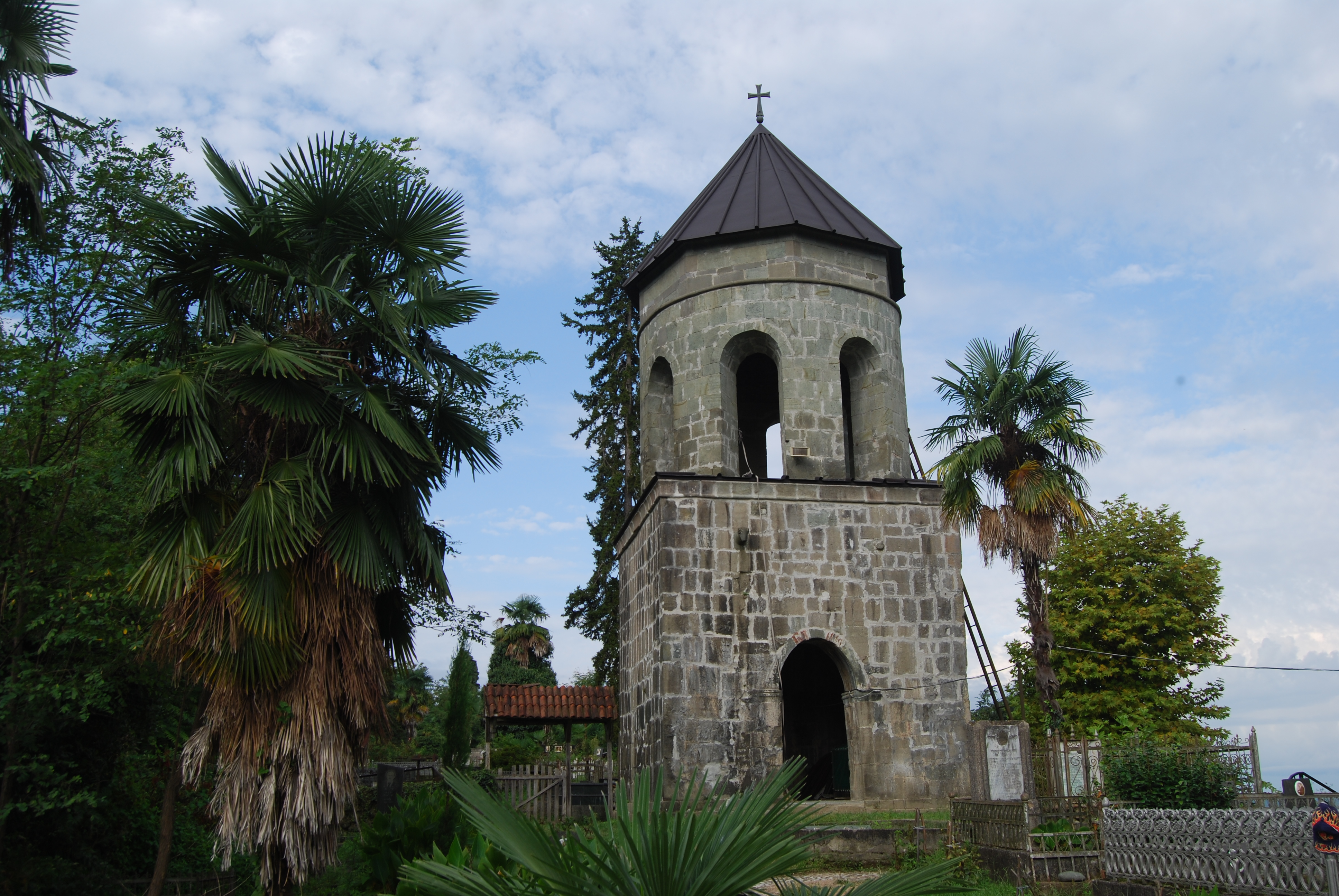 ლიხაურის ეკლესიის სამრეკლო